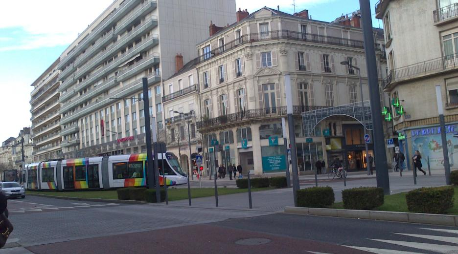 Carrefour Alsace-Foch, Angers, décembre 2013